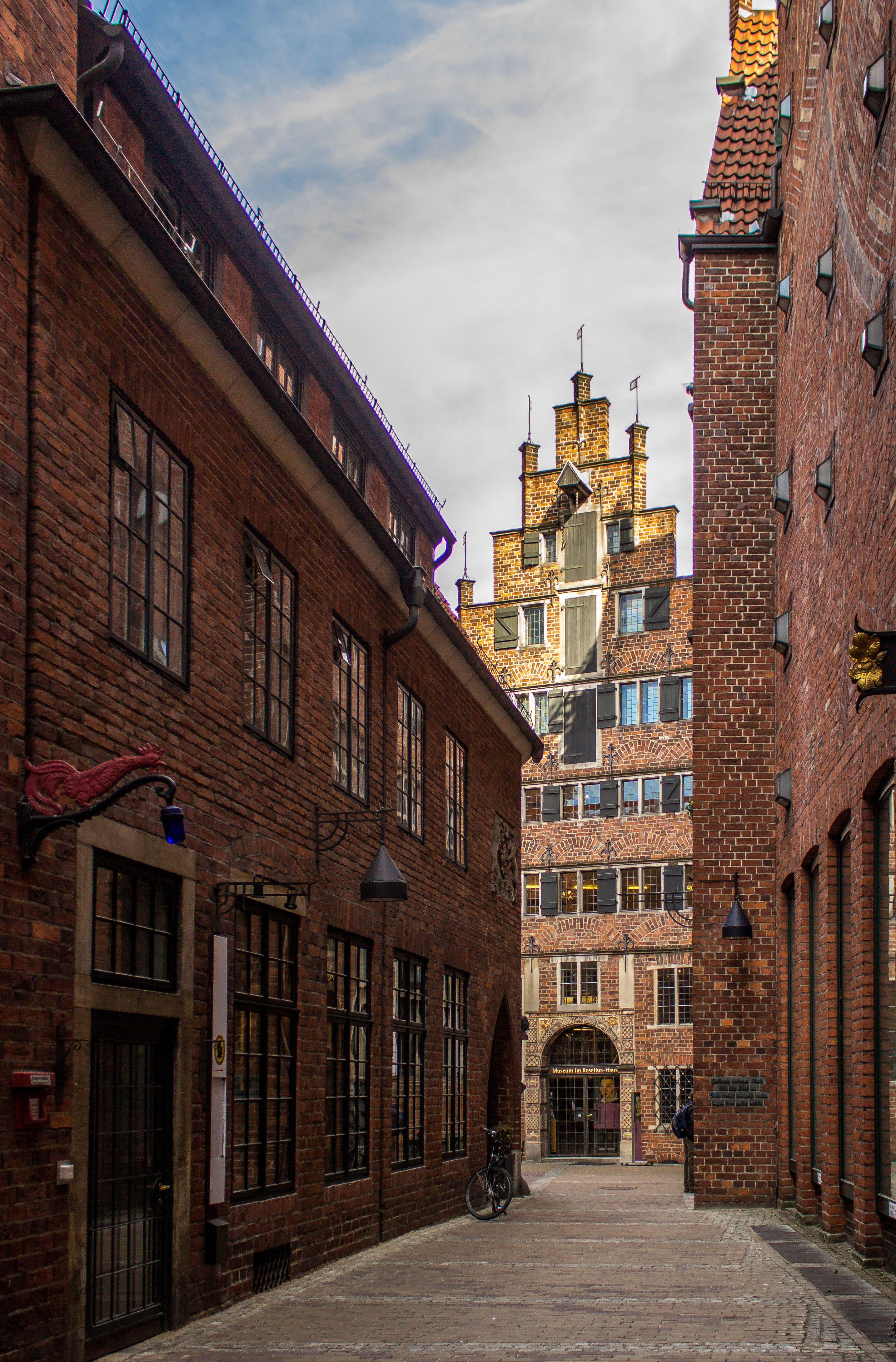 Böttcherstraße in Bremen, Böttcherstraße 1Die Gesamtanlage ist ein geschütztes Kulturdenkmal in der Freien Hansestadt Bremen, mit der Nr. 0209,T beim Landesamt für Denkmalpflege registriert.